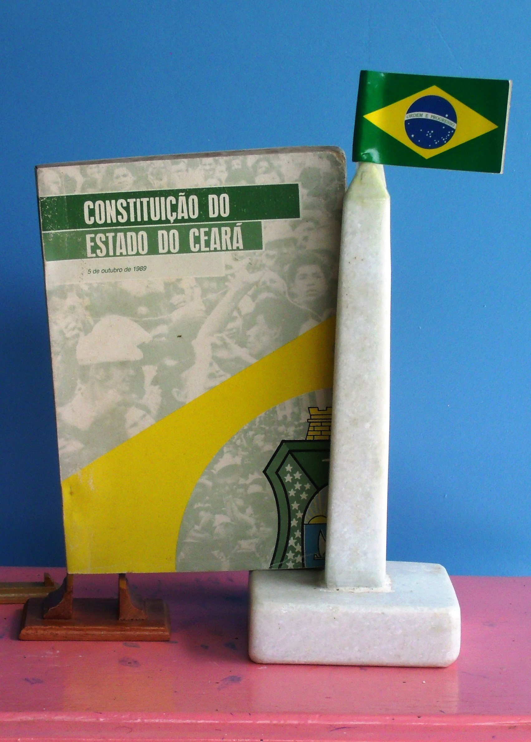 Constituição do Estado do Ceará de 1989 e mini obelisco com bandeira do Brasil.